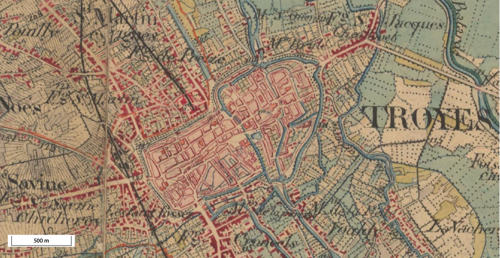 Carte d'État-major au 1/80000 de Troyes et alentours, département de l'Aube, France.